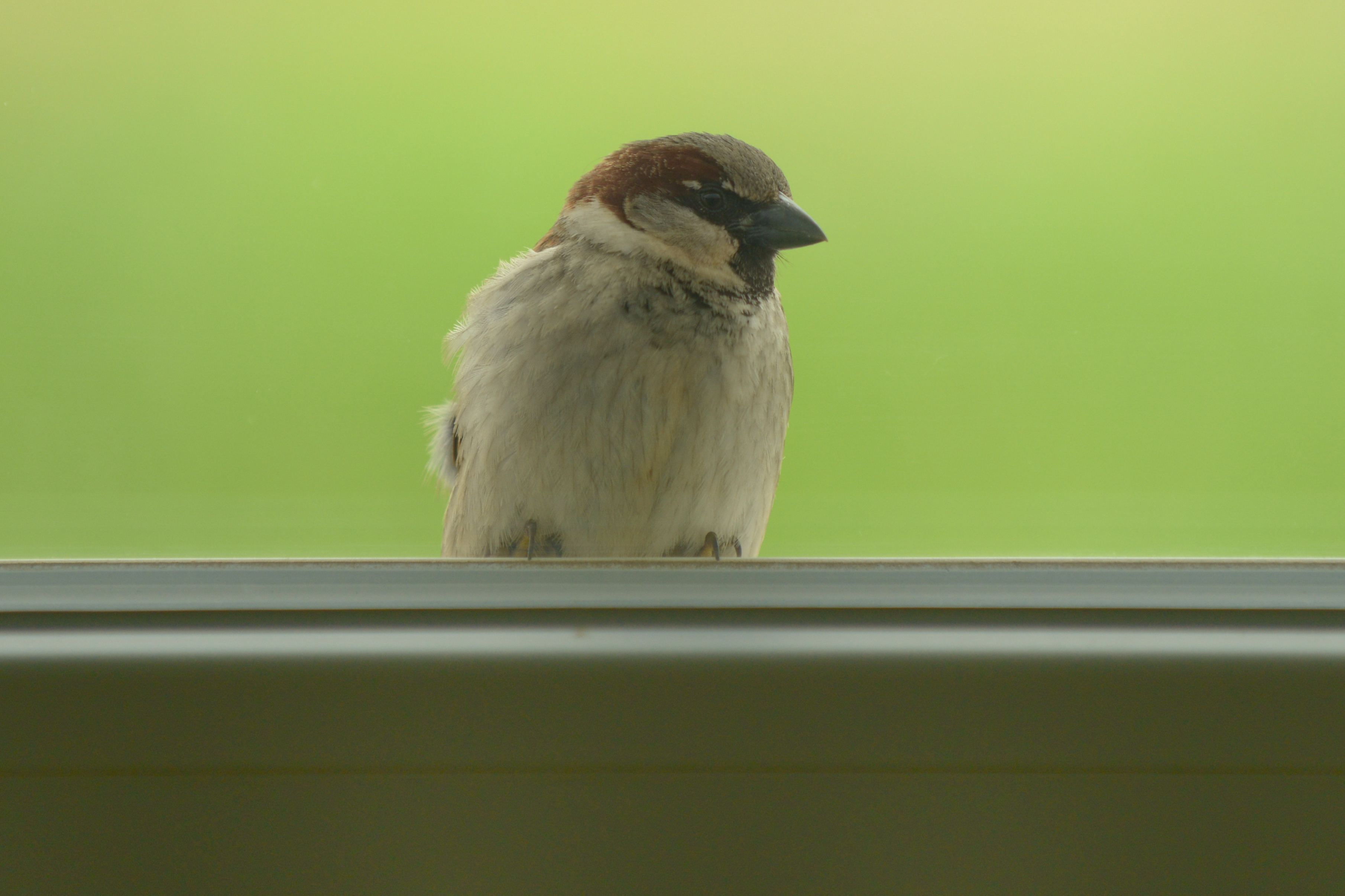 Haussperling beim Spiegelfechten an einer Fensterscheibe am Wohnhaus (2018).